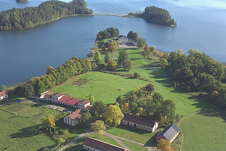 Motiv: Elghammar Nyckelord: Byggnadsminnen, Flygbilder, Riksintressen Kategori: Herrgårds-/slottslandskapElghammar